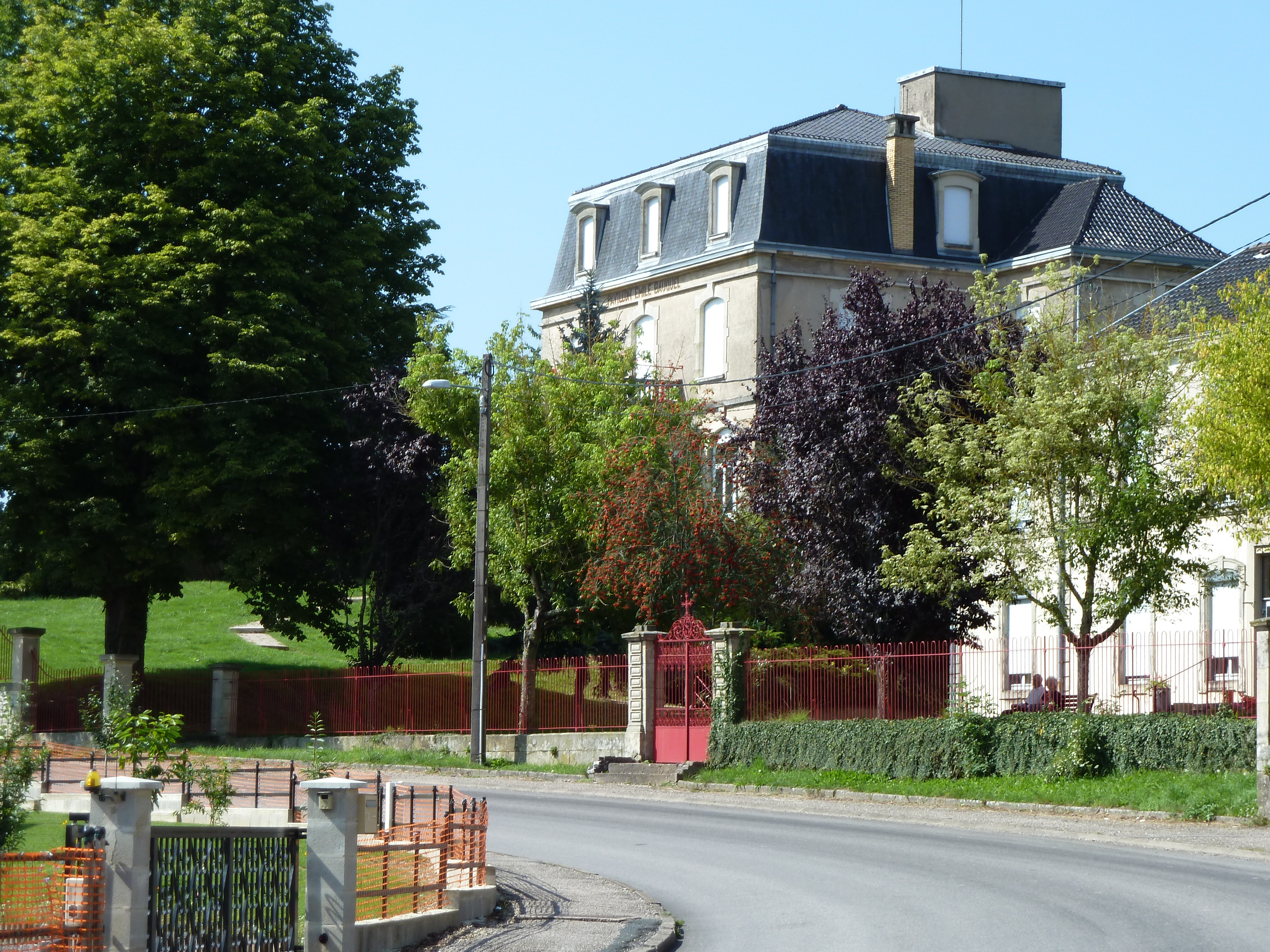 Cirey-sur-Vezouze "Pavillon Emile Bauquel" selon l'inscription qui figure au fronton du bâtiment lui-même (visible sur la photo). Il abrite les services administratifs de l'hôpital.